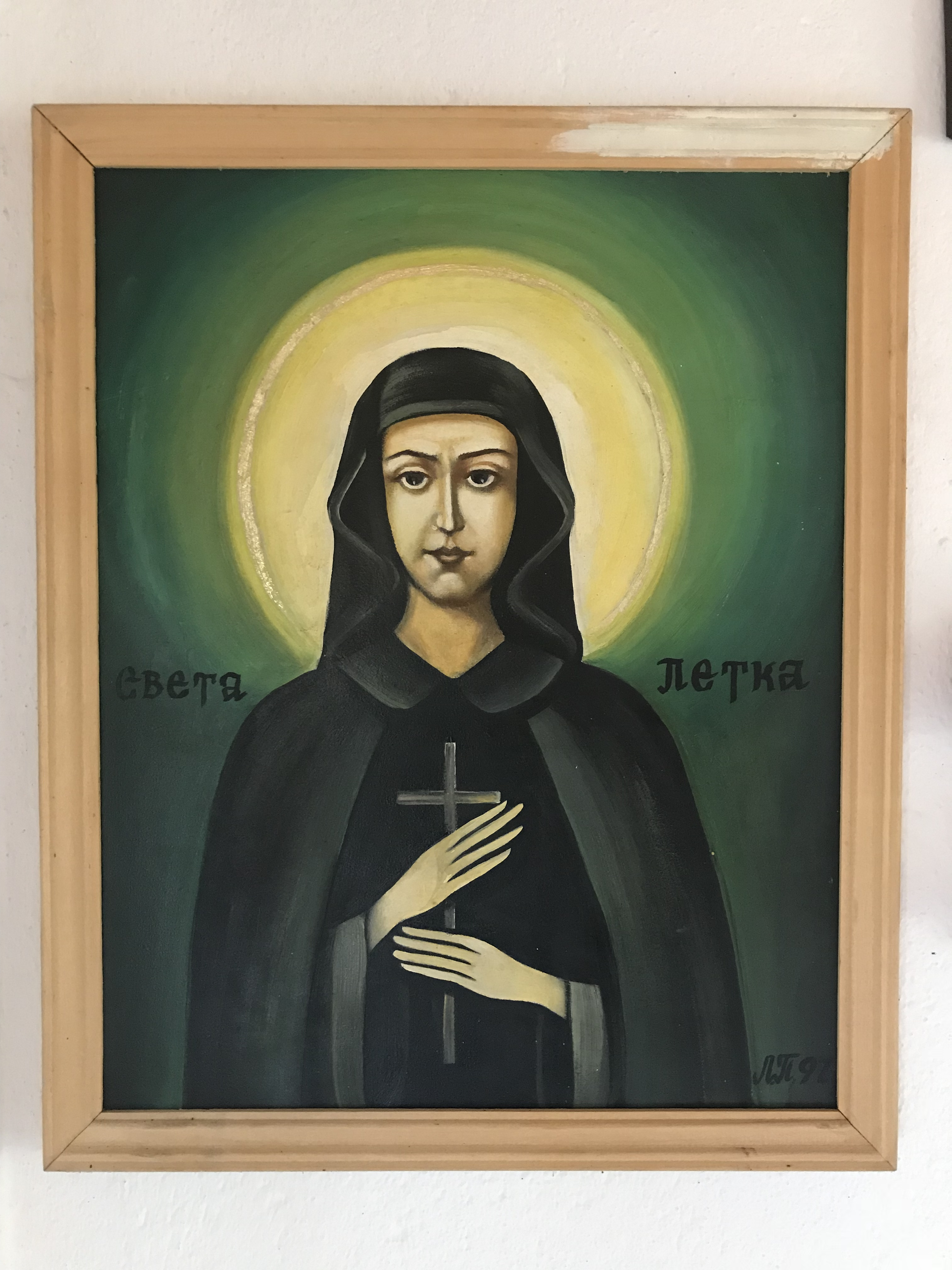 Икона на “Света Петка Българска”